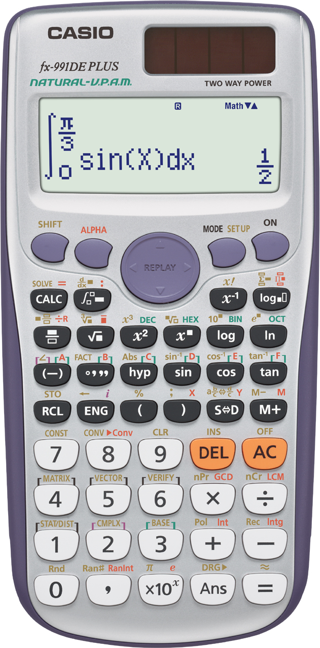 Technisch-wissenschaftlicher Taschenrechner, Nachfolger der FX-991ES